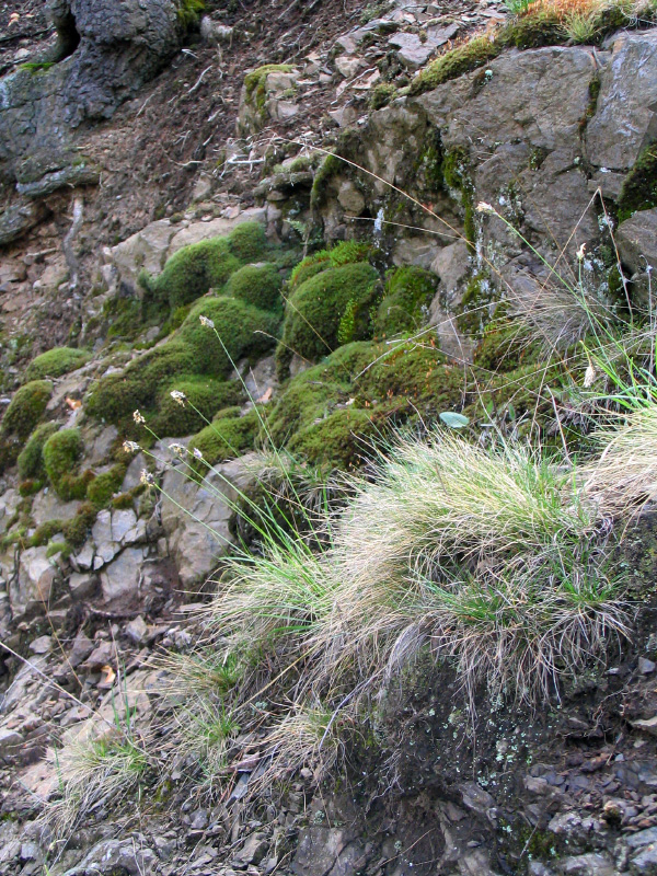 Pěchava vápnomilná s mechy na Malochově skalce. (30. duben 2006)